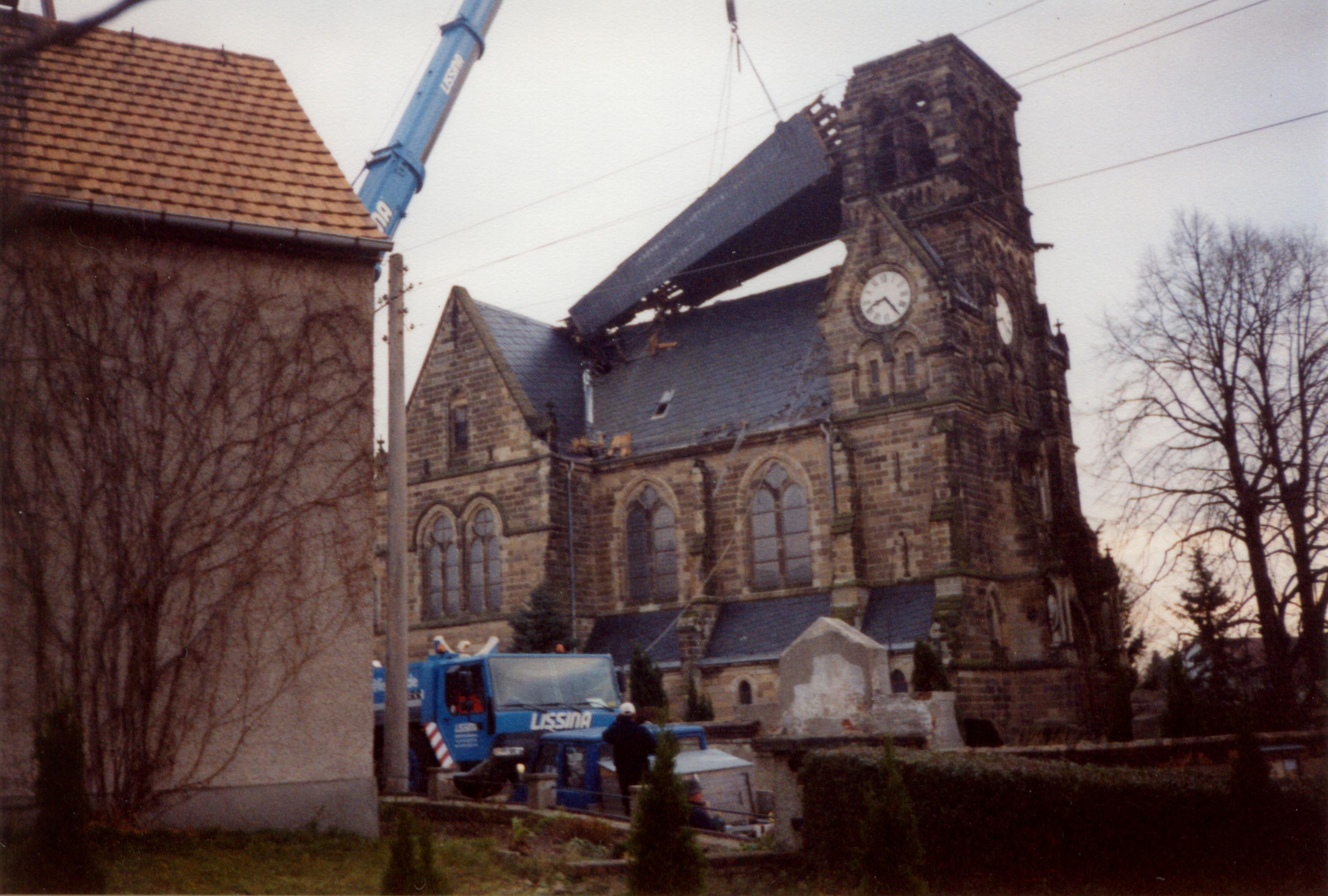 Kirche Großdobritz , Bergung der umgebrochenen Turmspitze nach Orkanschaden 2002, Scan eines analogen Fotos